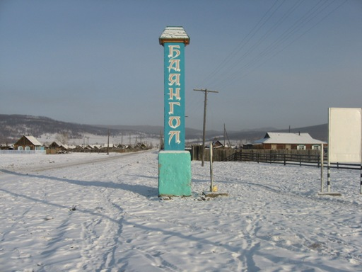 Въезд в улус (село) Баянгол, Закаменский район Бурятии